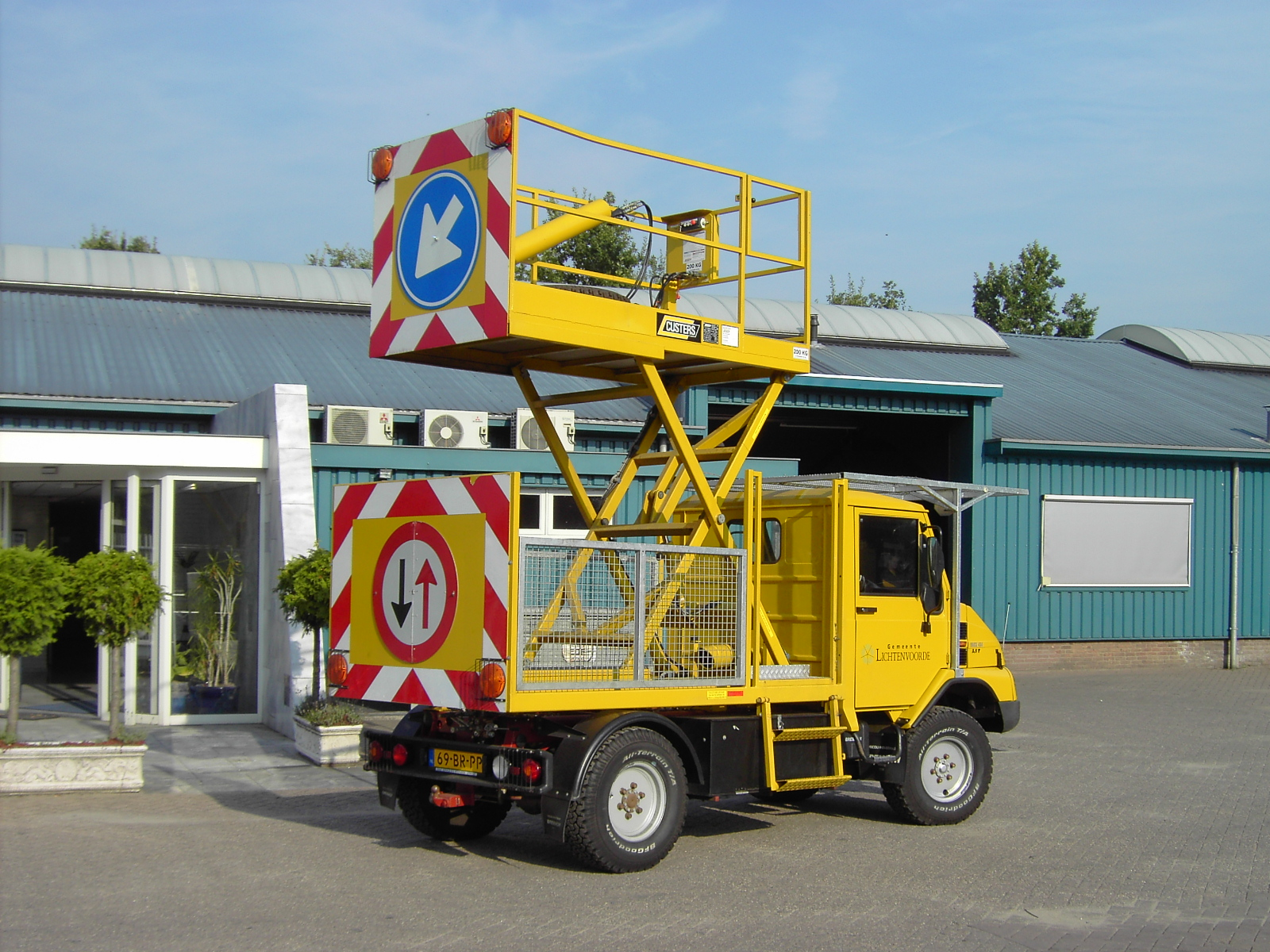 BREMACH con allestimento PIATTAFORMA